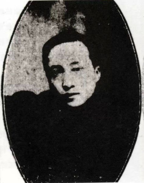 Portrait photographique de Wu Fading.